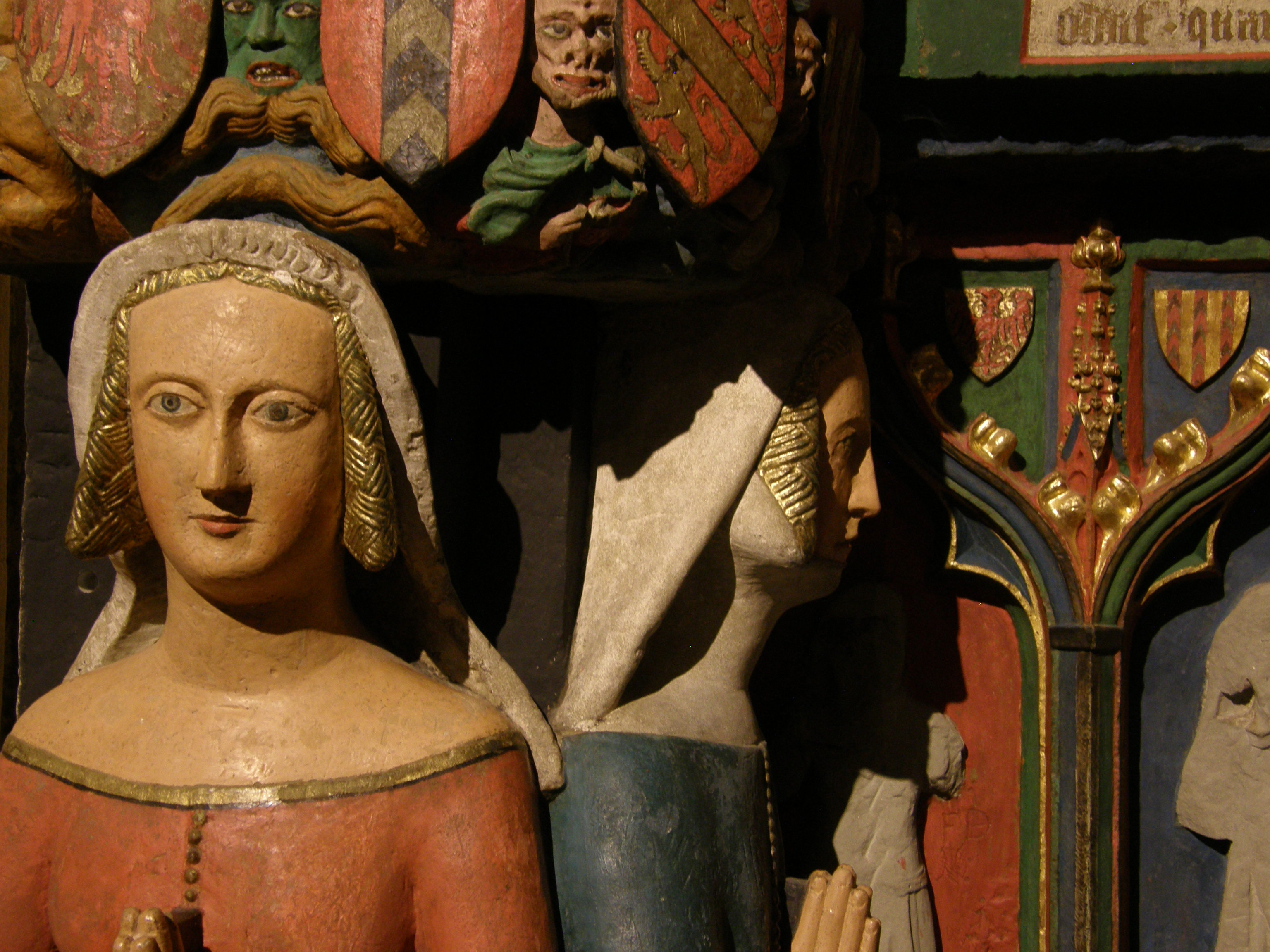 Gros plan d'un détail du cénotaphe des comtes de Neuchâtel.